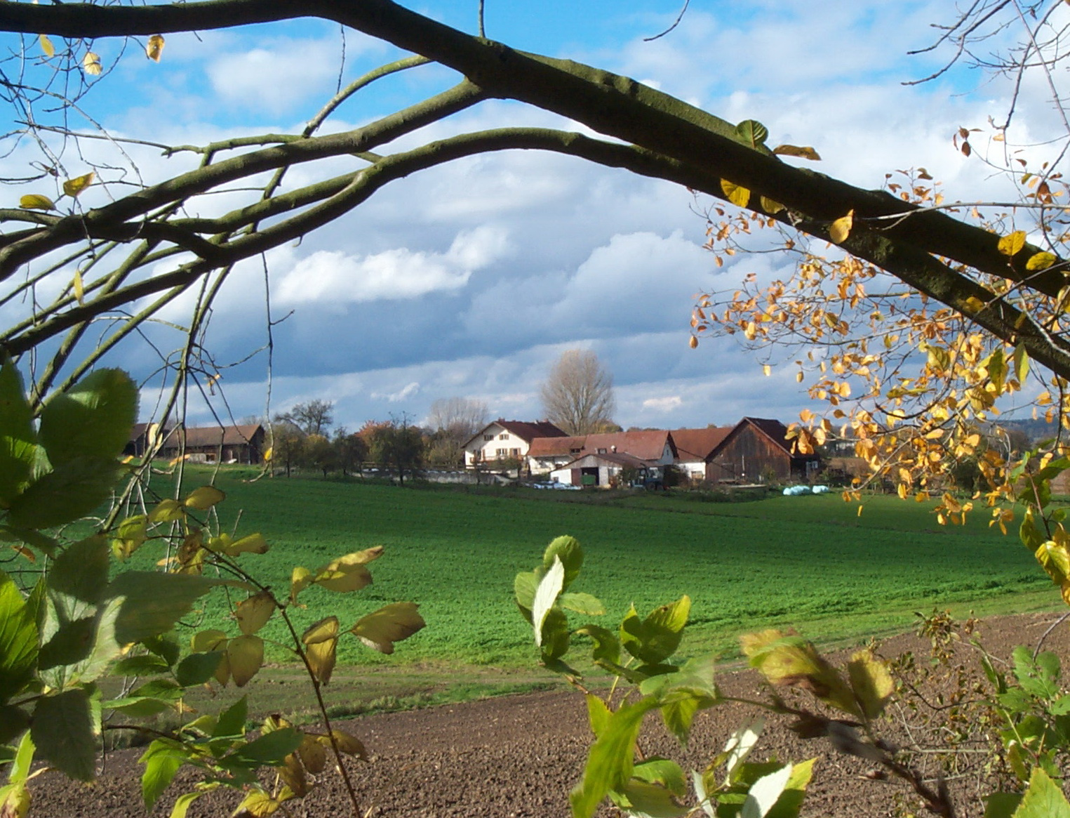 Der Einödhof Poschenhof liegt etwa sechs Kilometer südlich von Laberweinting, acht Kilometer östlich von Mallersdorf und zwei Kilometer östlich von Hofkirchen.